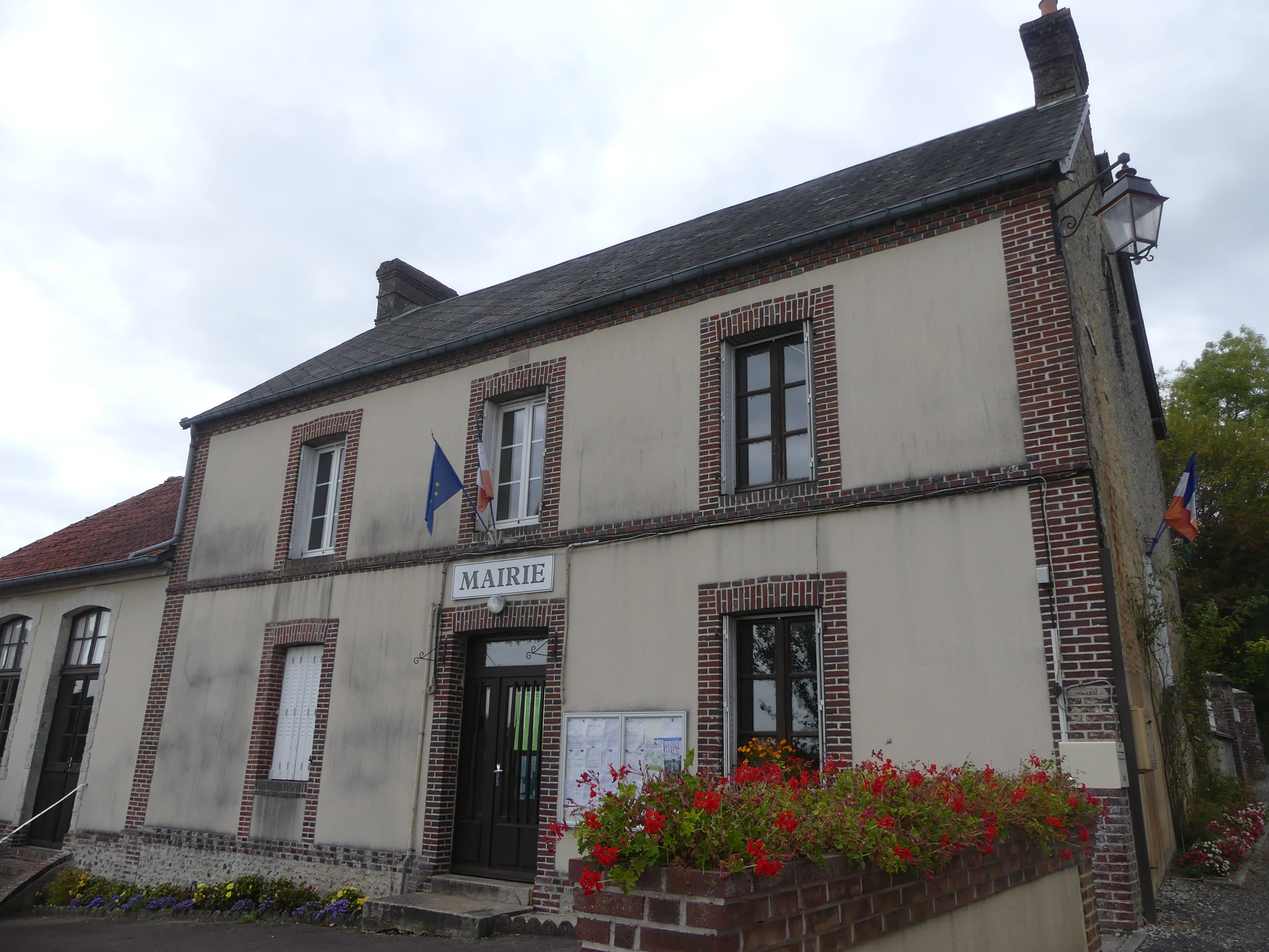 Façade